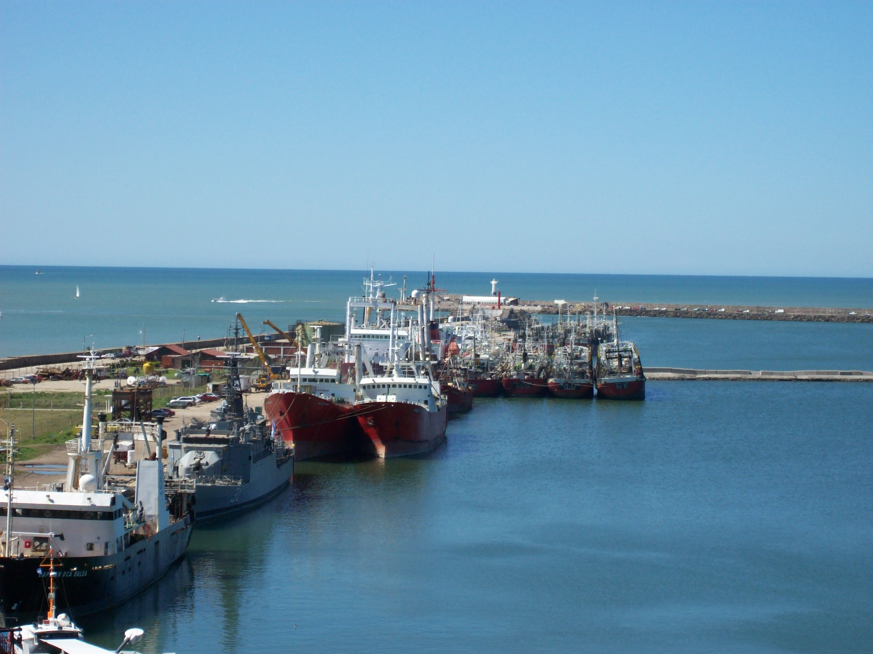 Barcos en la escollera norte del Puerto de Mar del Plata, Provincia de Buenos Aires, Argentina. A la izquierda se encuentra la escollera norte y al fondo, escollera sur.